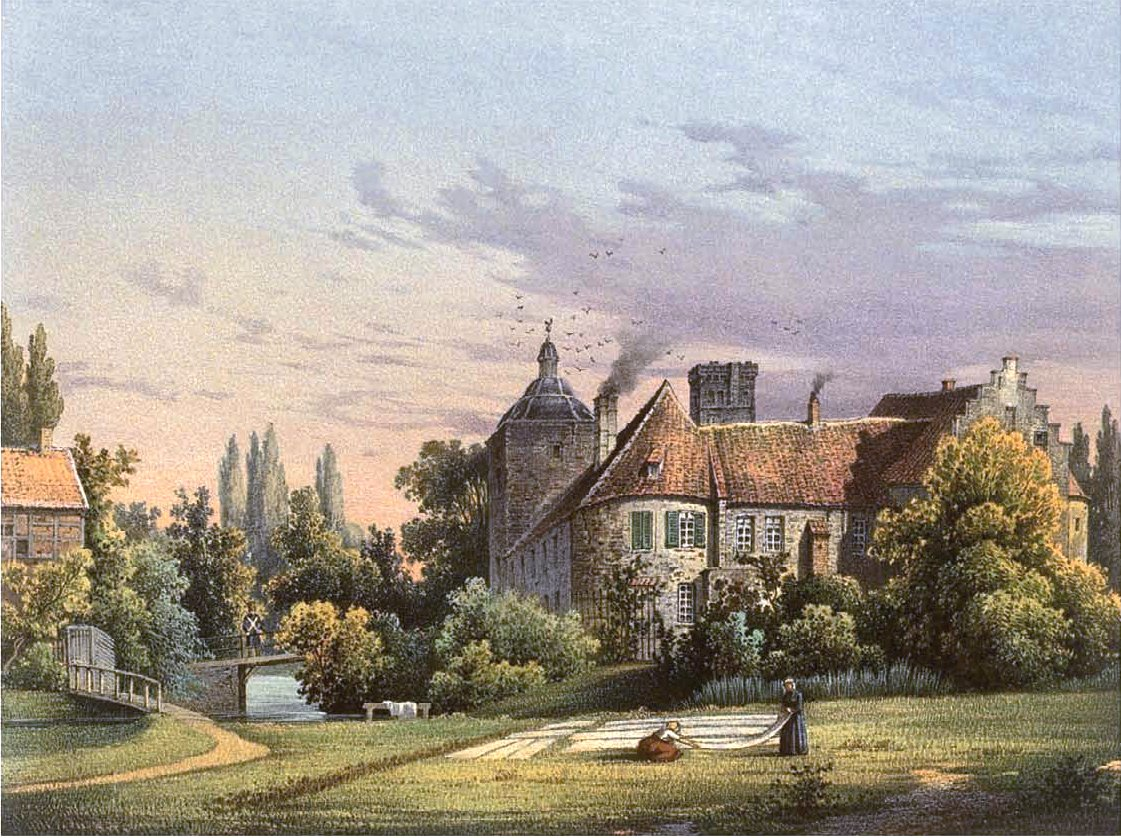 Burg Steinfurt, Lithografie aus dem 19. Jahrhundert